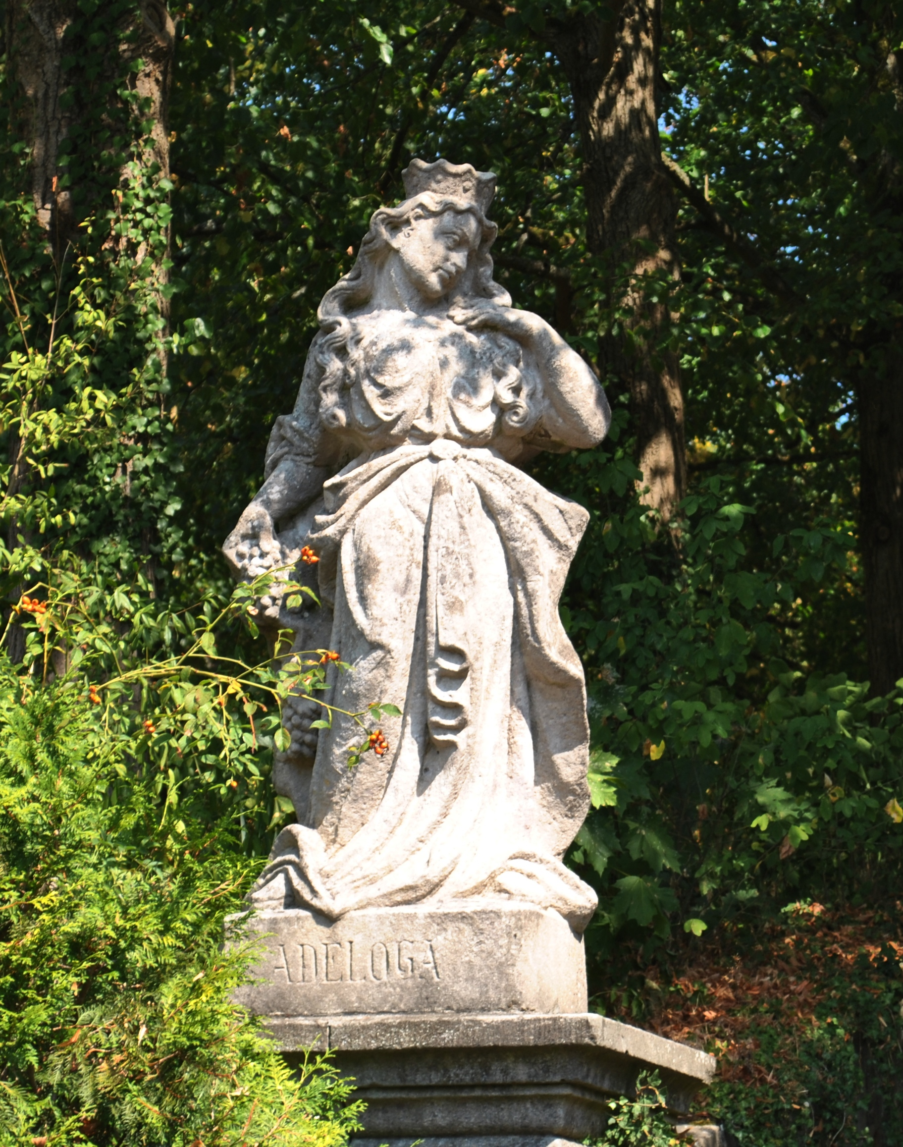 Statue heilige Hadeloga (bez. "Adeloga"), Park Schwanberg, Carlo Müller (um 1935)